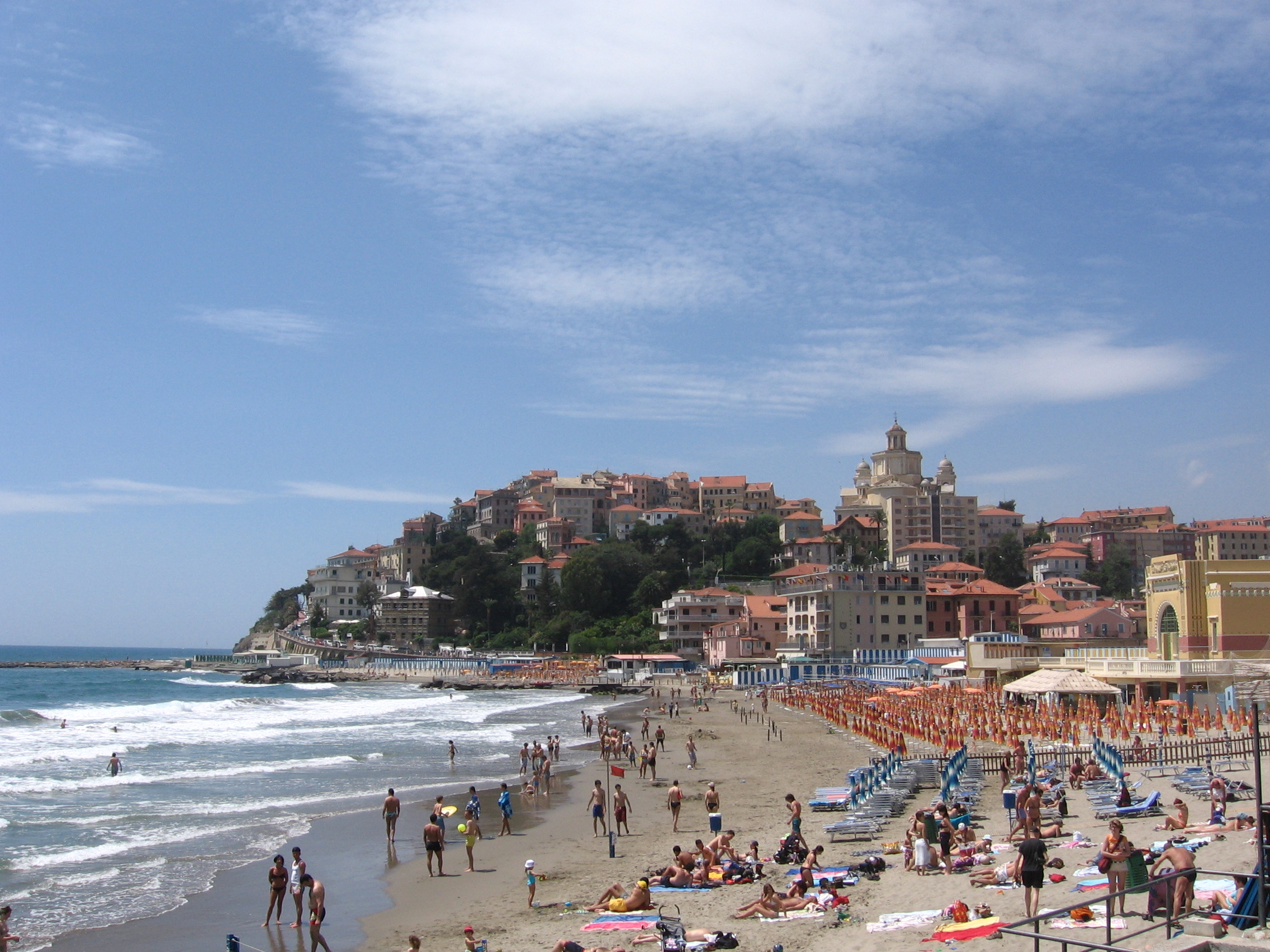 Panorama di Porto Maurizio (Imperia), Liguria, Italia